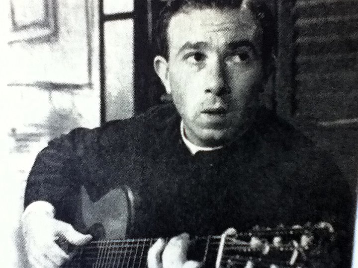 Foto Padre Alejandro